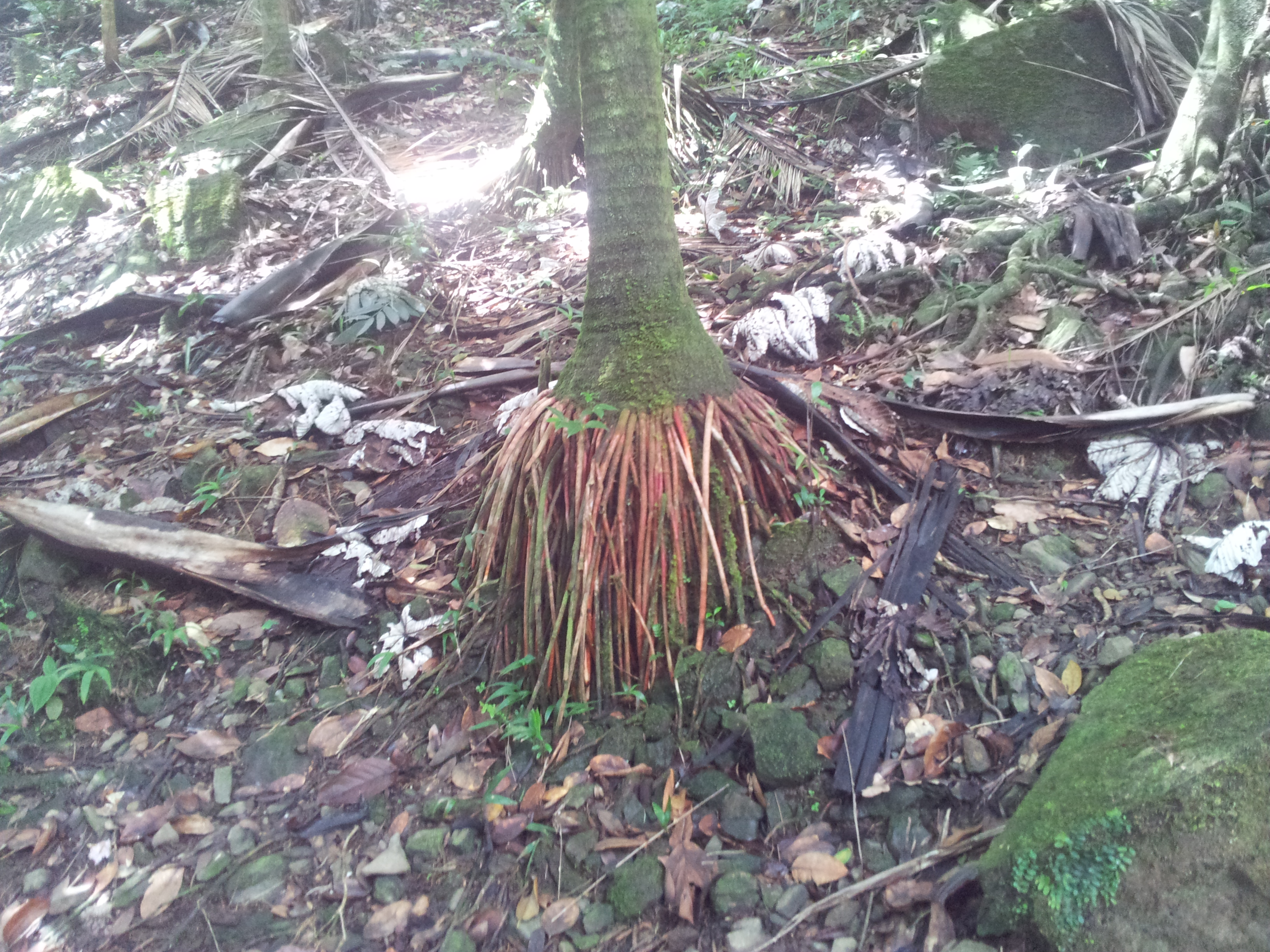 Raices de palma de sierra (Prestoea montana), Bosque Nacional de El Yunque, Puerto Rico.